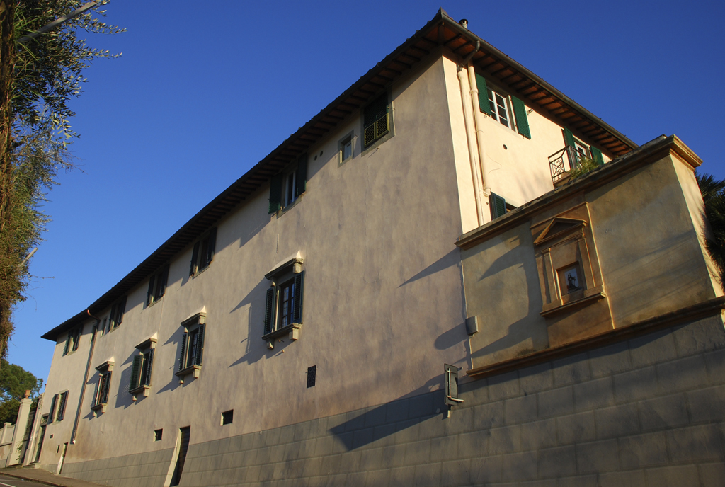 Villa Guaita or Villa Pieraccioni, Florence, Italy. Overview from via del Portico.